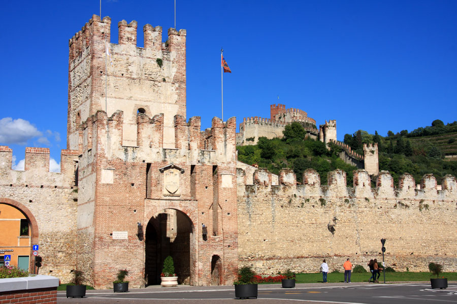 Veduta della cinta muraria di Soave con porta Verona e il castello sullo sfondo